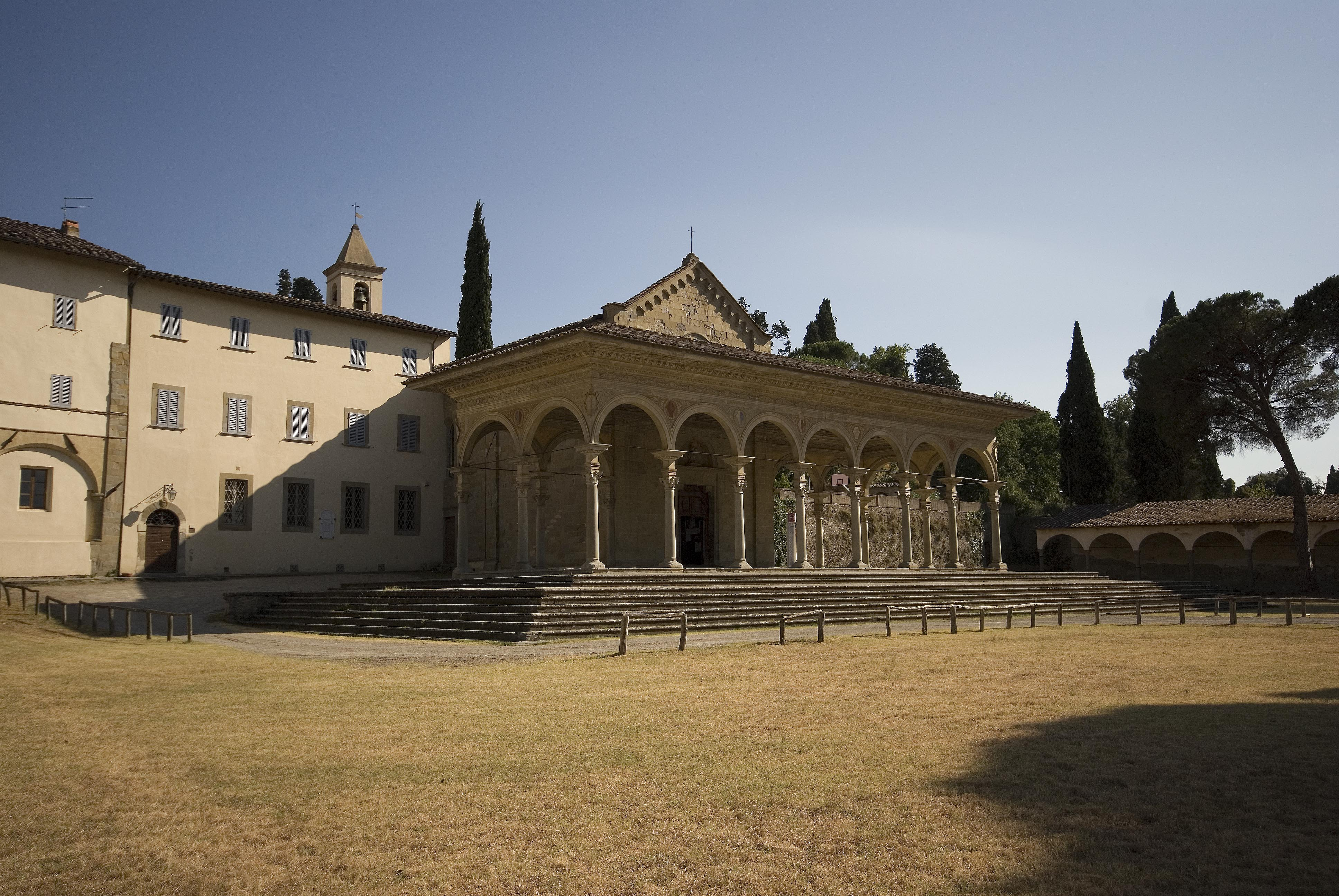 La chiesa di Santa Maria delle Grazie ad Arezzo.